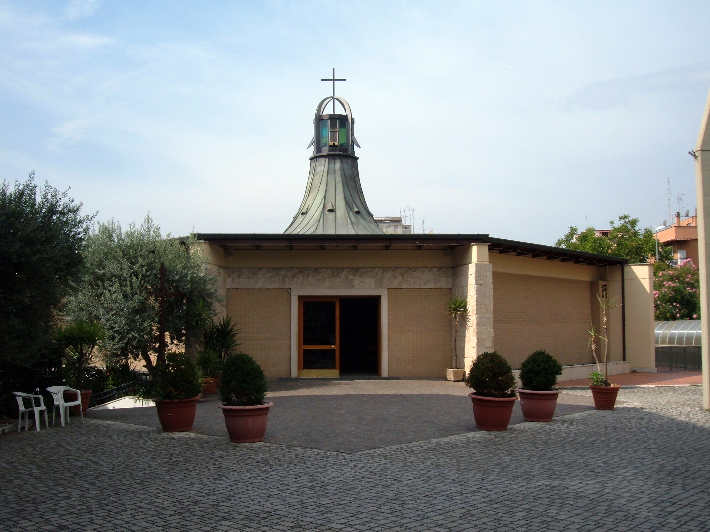 Chiesa di San Cleto, a Roma, nel quartiere San Basilio, in via Bernardino Bernardini.